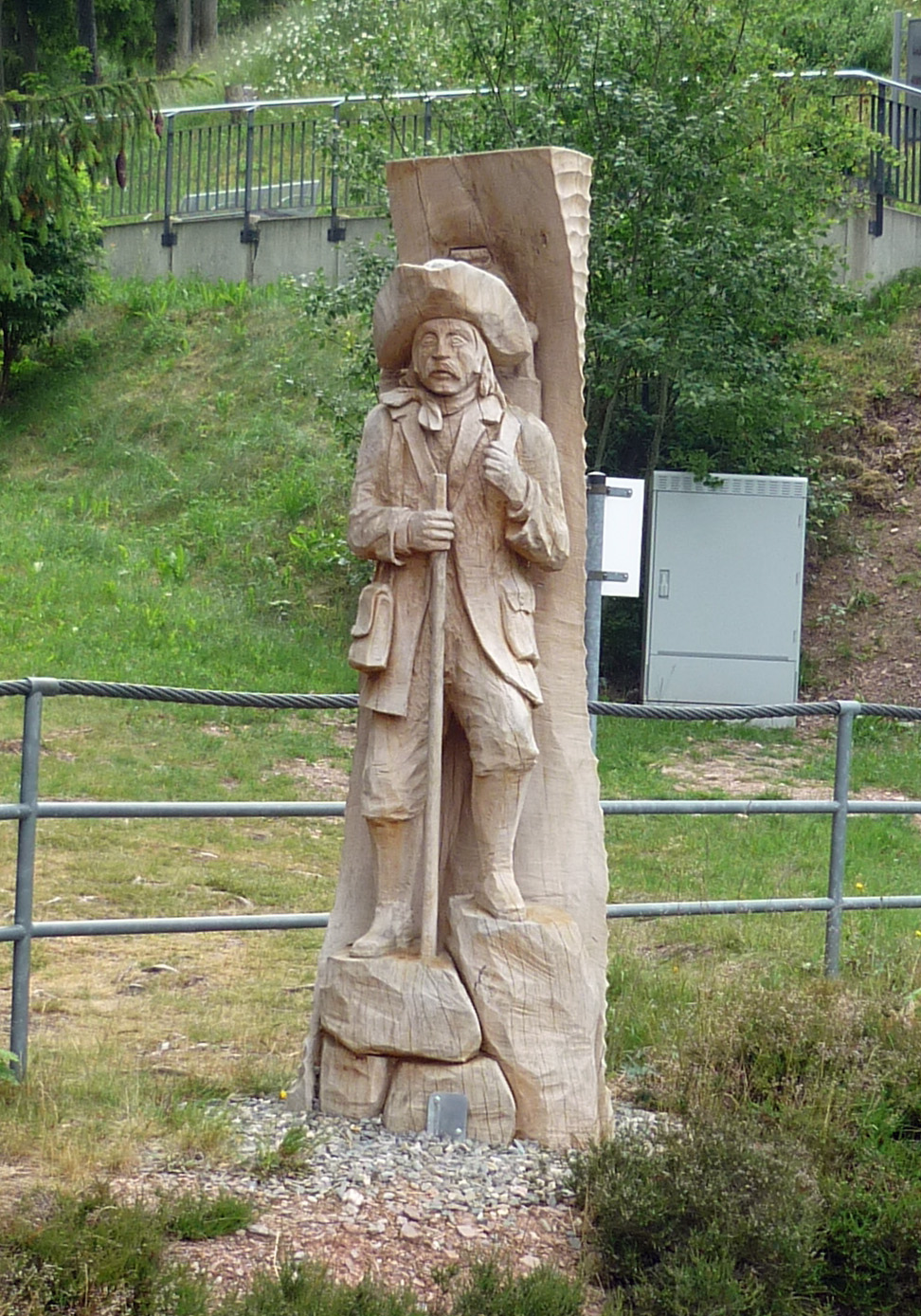 Holzskulptur Buckelapotheker an der Oberweißbacher Bergbahn (im Rahmen des Holzbildhauersymposium an der Bergstation Lichtenhain 2012 entstanden)